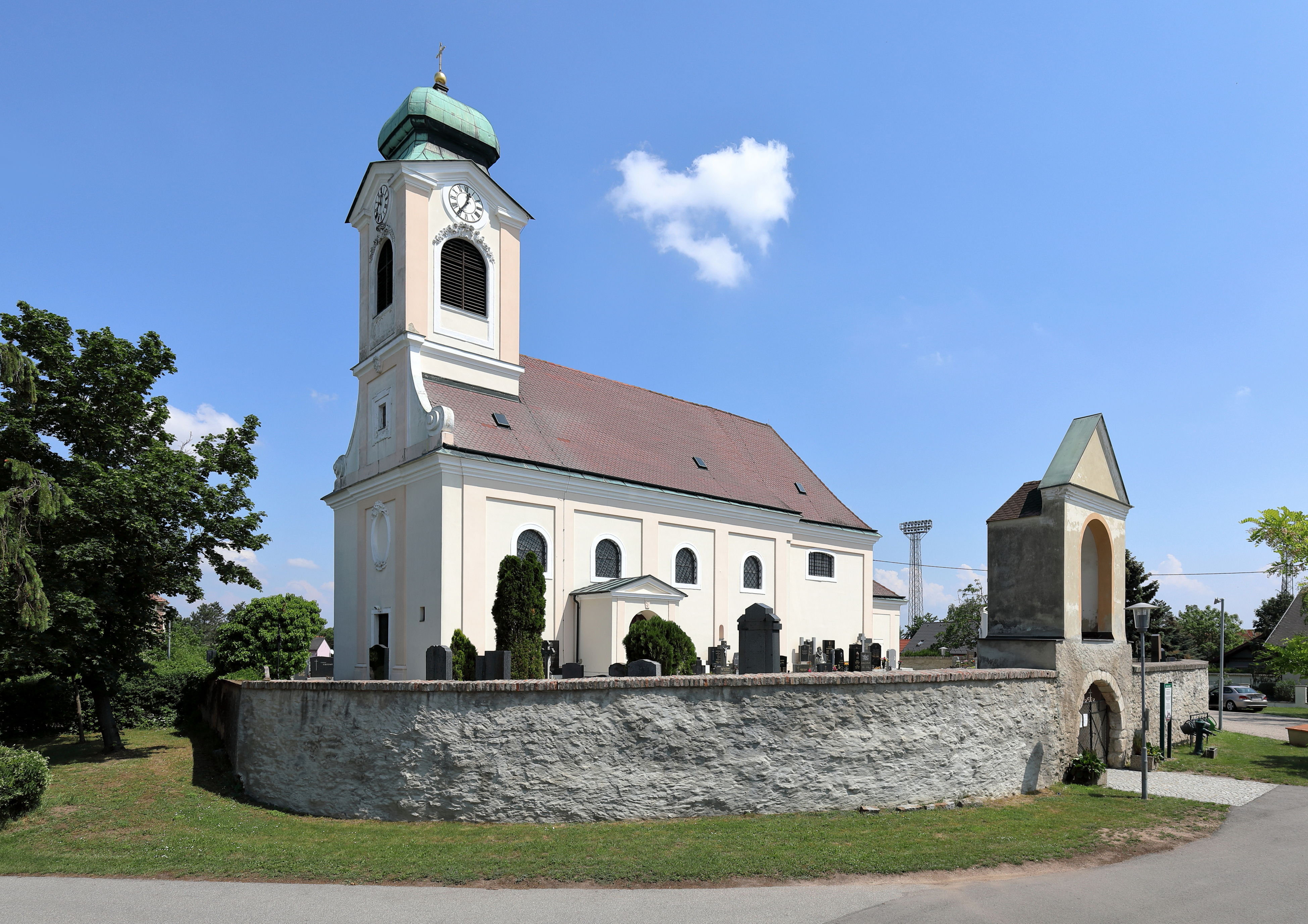 Südwestansicht der röm.-kath. Pfarrkirche hl. Veit in der niederösterreichischen Gemeinde Untersiebenbrunn.Die in erhöhter Lage errichtete Kirche ist von einem Friedhof mit Mauer umgeben. Die barocke Kirche wurde 1710 anstelle einer mittelalterlichen Wehrkirche, die zuvor großteils abgetragen wurde, errichtet.